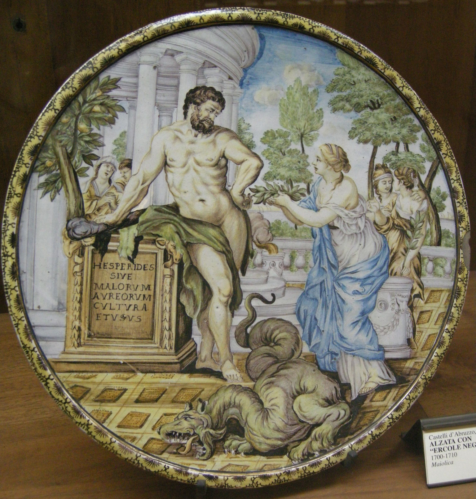 C.sf., castelli, carmine gentile, alzata con ercole nell'orto delle esperidi, 1700-1710